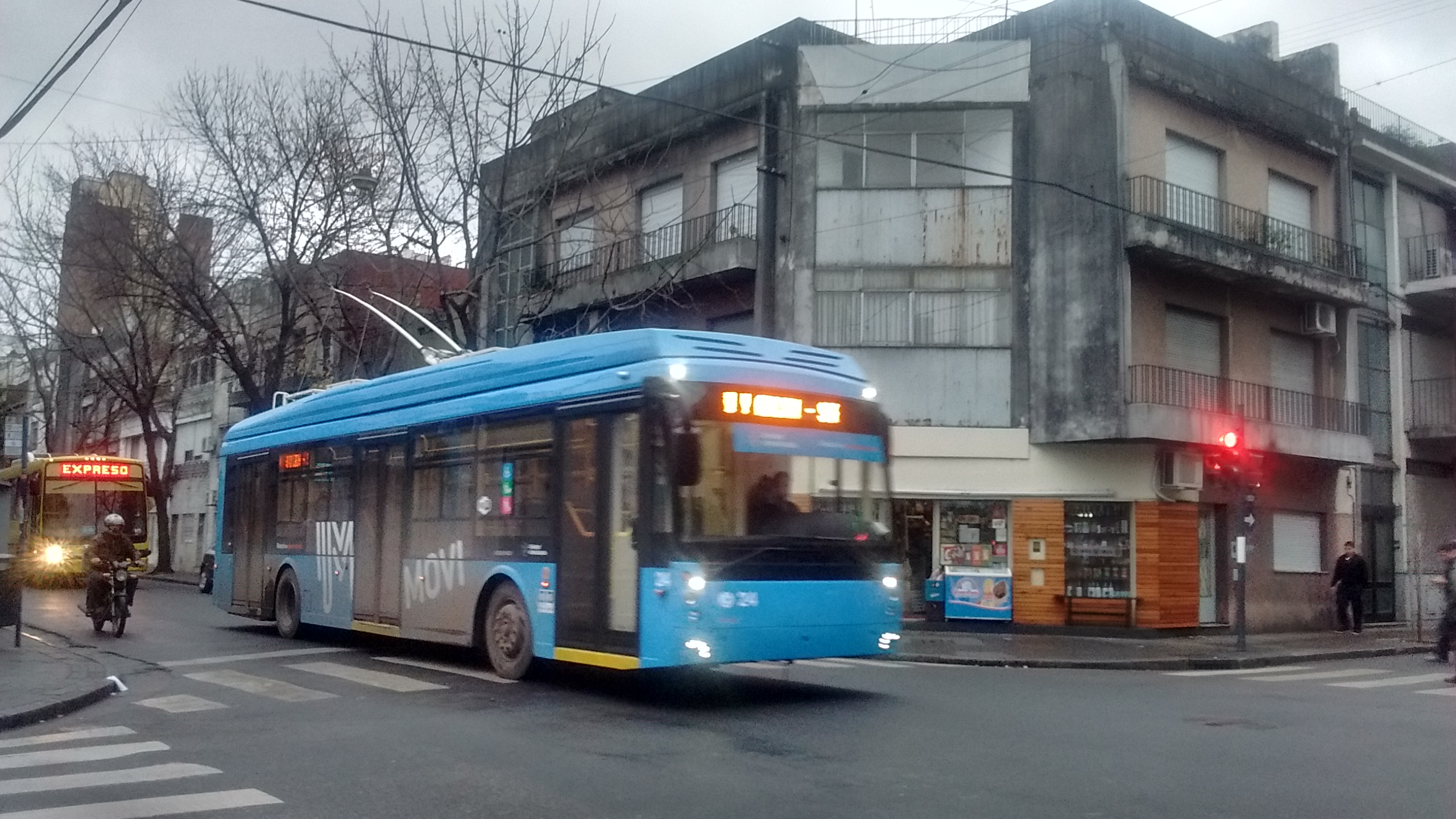 Coche Trolza Megapolis de la Línea Q de trolebuses rosarinos. Intersección de calle Mendoza y Pte. Roca.